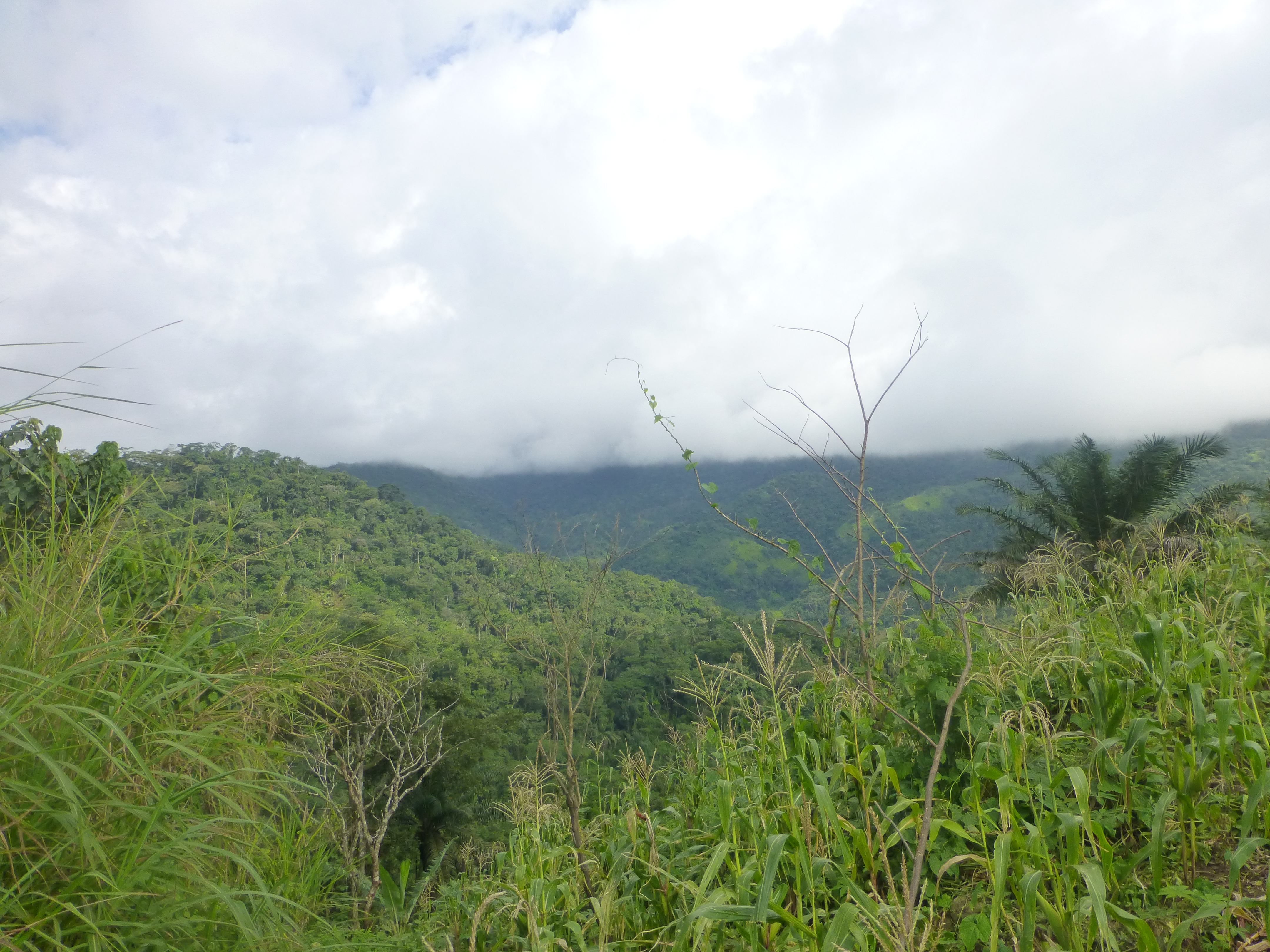 Sanctuaire de Bayang Mbo